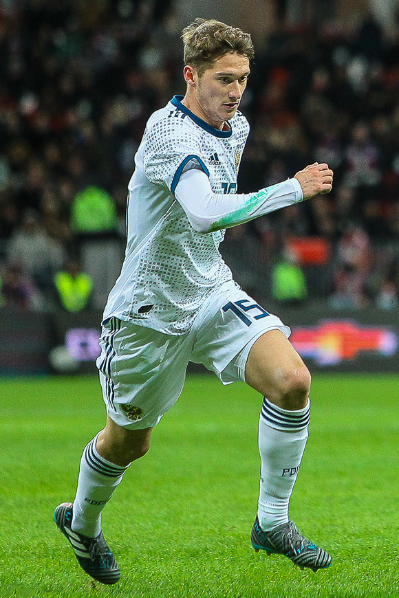 Россия проиграла Бразилии со счетом 0:3